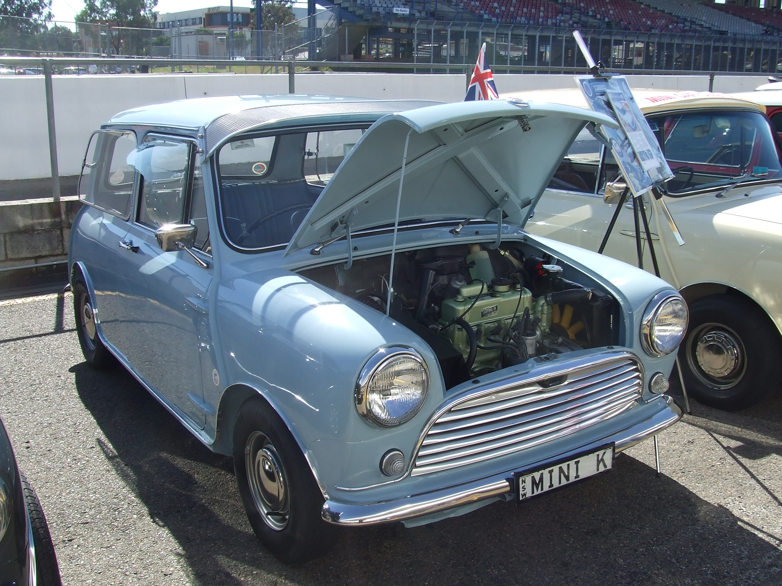 Morris Mini K